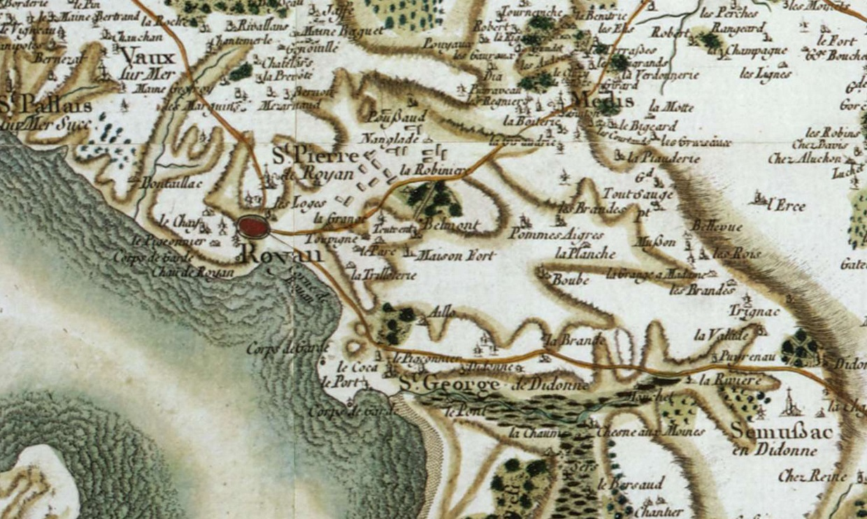 Carte de Cassini : extrait montrant la région de Saint-Georges-de-didonne Libre de droits (carte publiée au XVIIIe siècle)